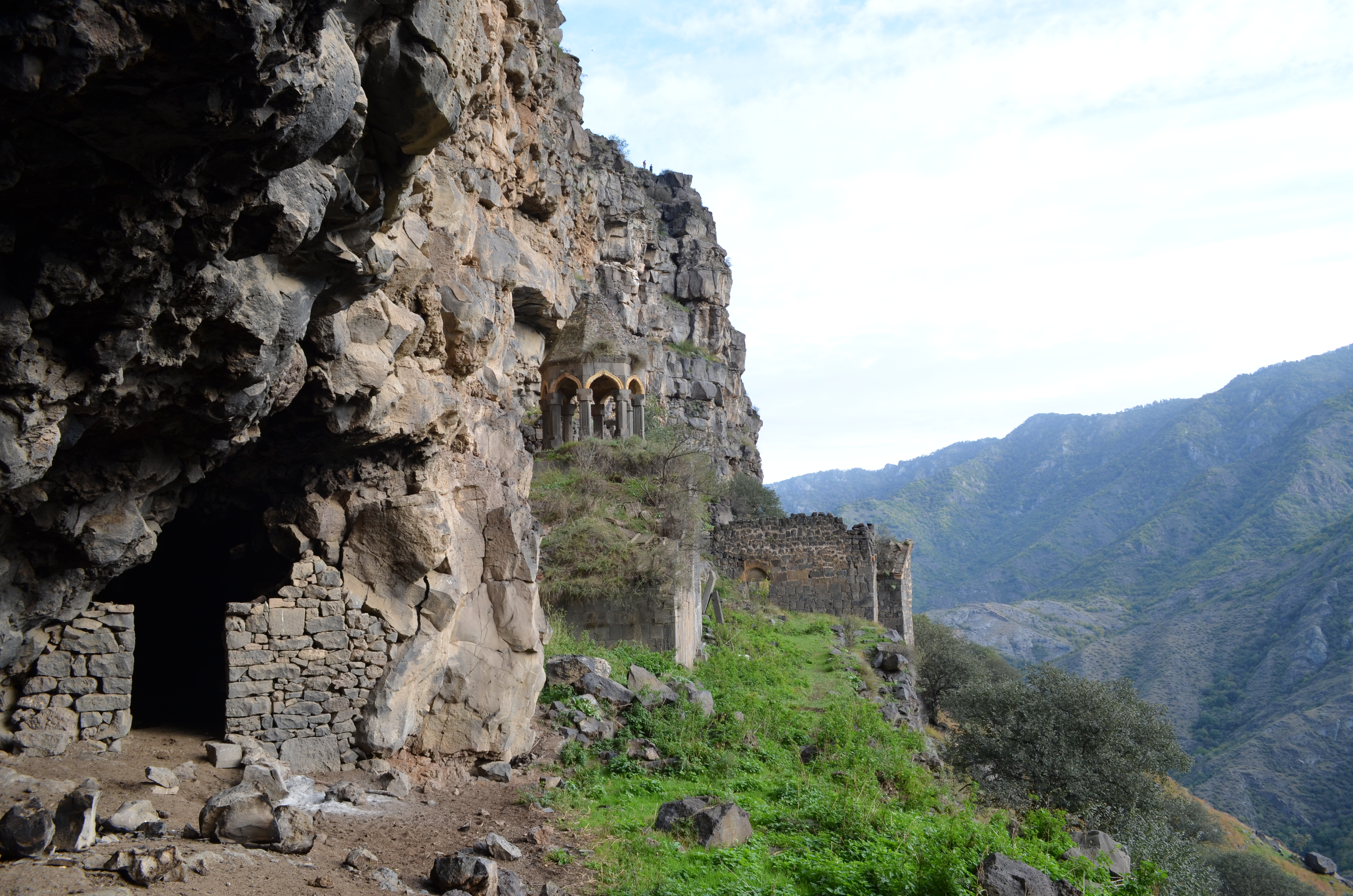 Վանական համալիր Հոռոմայրի Սբ. Նշան` ստորին հուշարձանախումբ 112/10